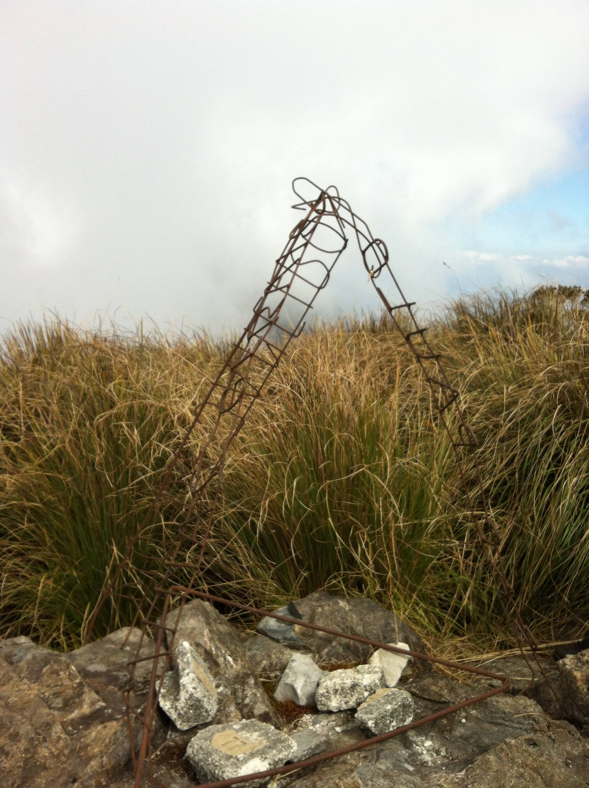 Travessia Serra Fina / Pico dos Três Estados: SP / MG / RJ